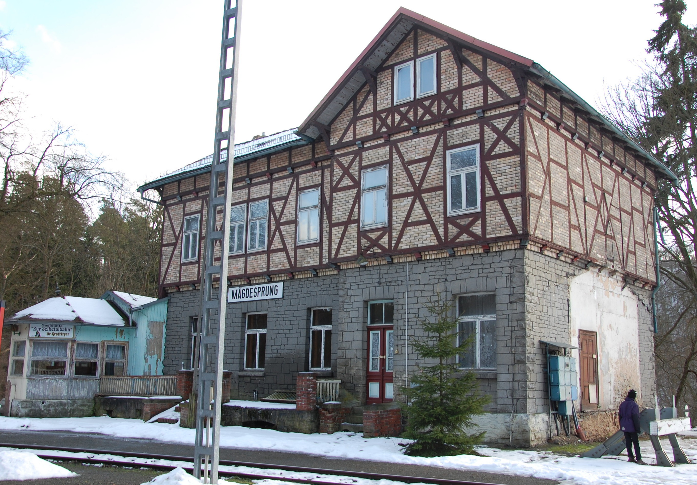 Bahnhof Mägdesprung